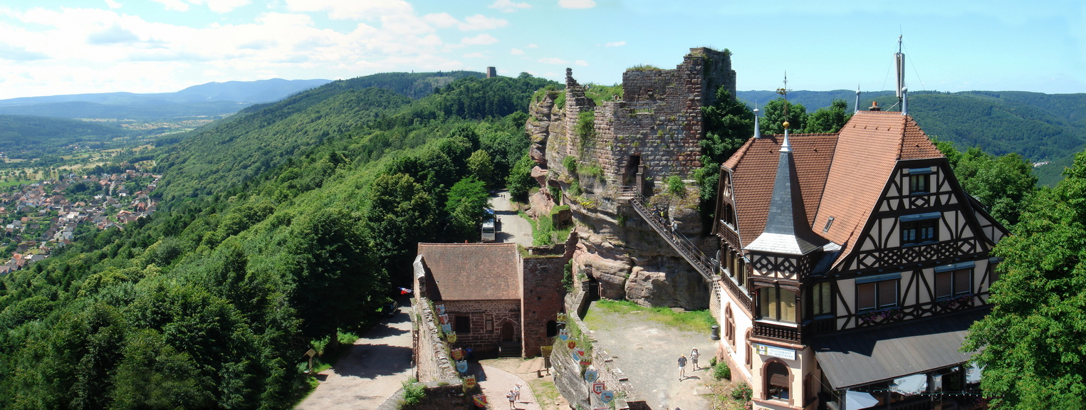 Panorama Château du Haut-Barr